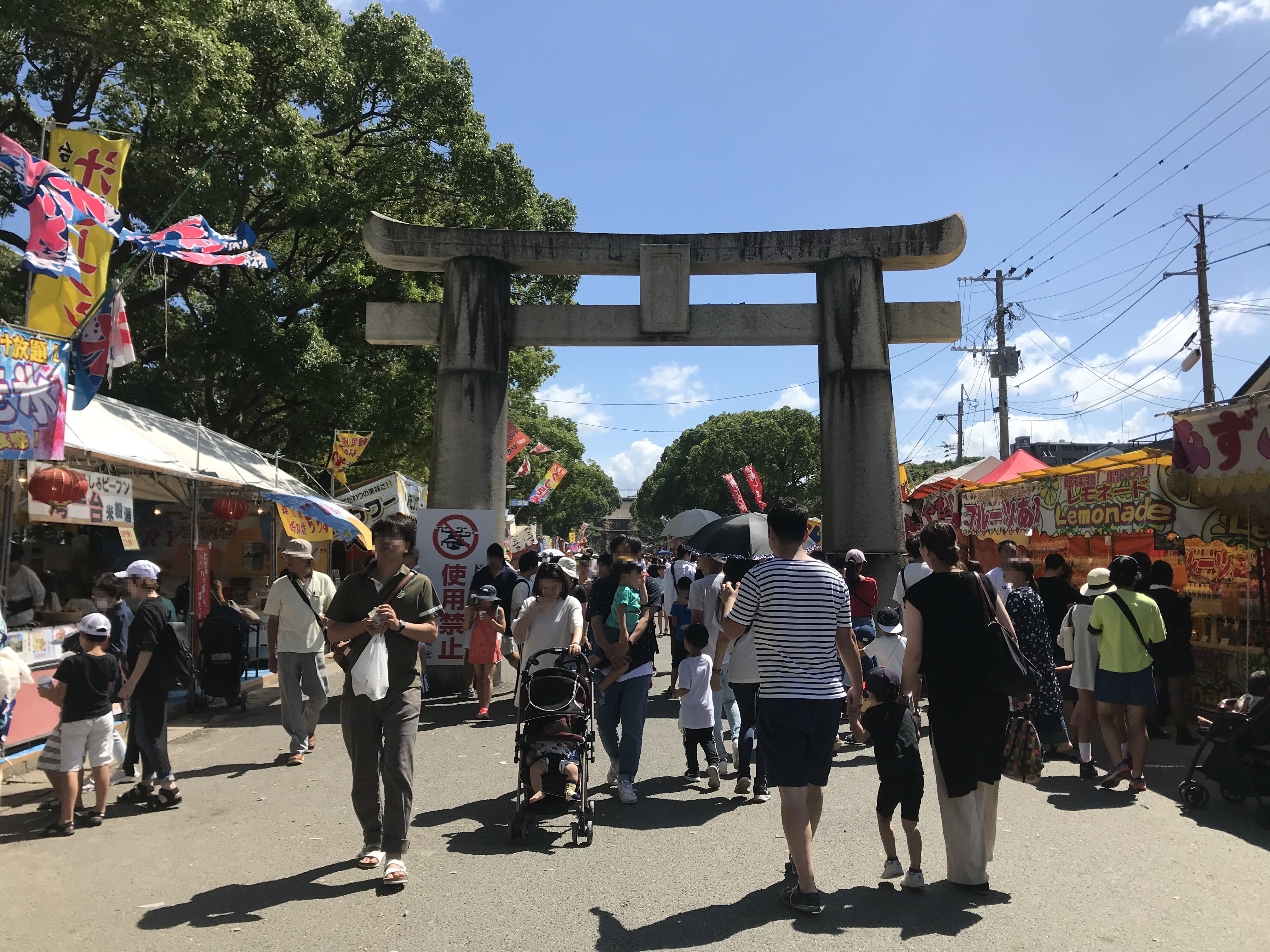 筥崎宮放生会